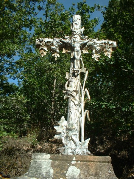 Croix de Saint-Jean de Castelpers (chemin de GR) - Saint-Just